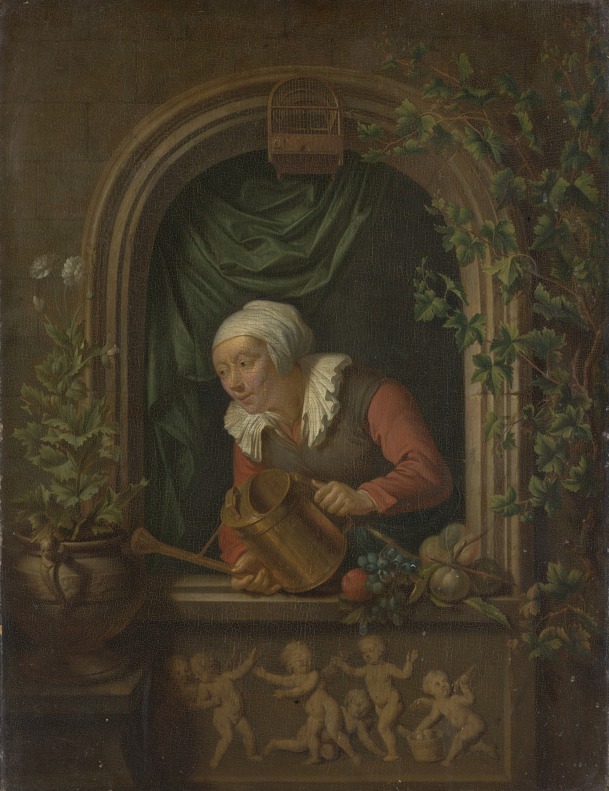 In een stenen venster geeft een vrouw met een gieter een papaver water. Rechts groeit klimop, op de vensterbank liggen druiven en ander fruit. Bovenin het venster hangt een vogelkooi, onder het venster een fries met putti die blindemannetje spelen.